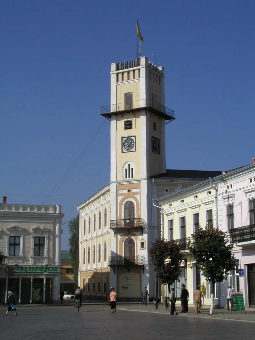 City Hall in Kolomyia (Ivano-Frankivsk oblast, Ukraine)